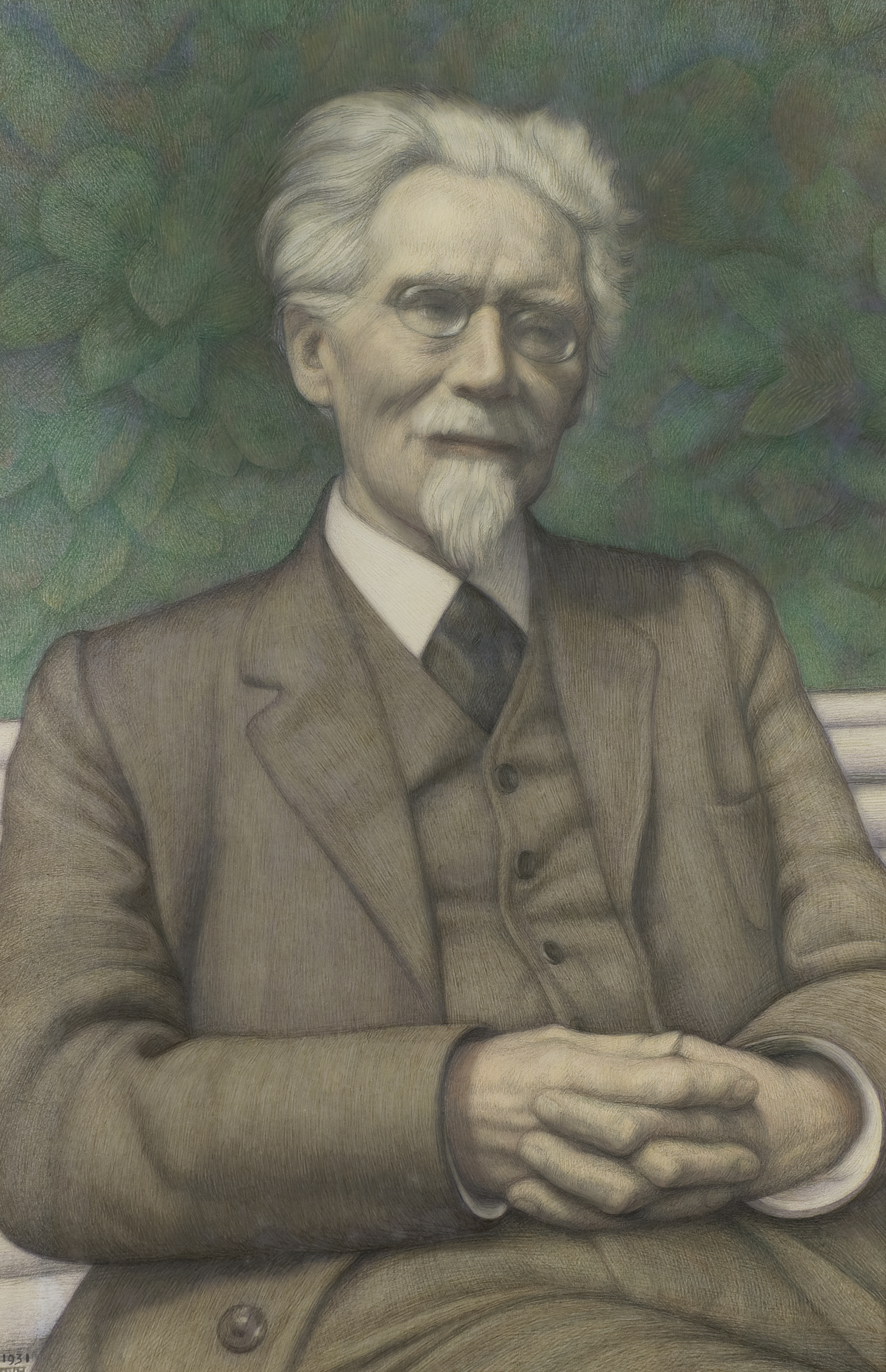 Gerard Heymans geschilderd door Bertha van Hasselt